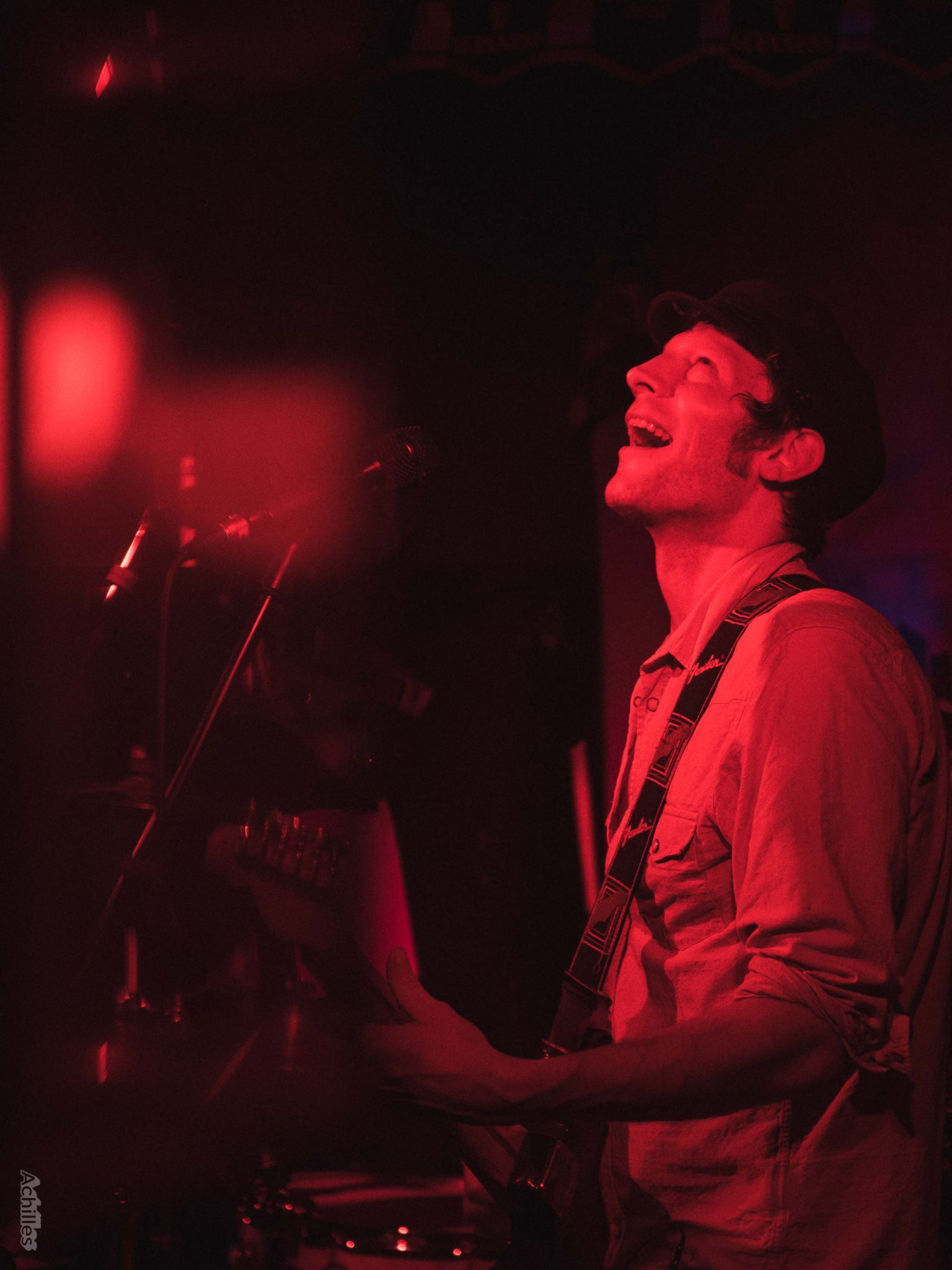 Frontmann, Pele Götzer auf der Bühne der Hafenschänke Subrosa in Dortmund. Aufgenommen am 7. April 2017 während des Release-Konzerts vom Album „Theater des Absurden“.